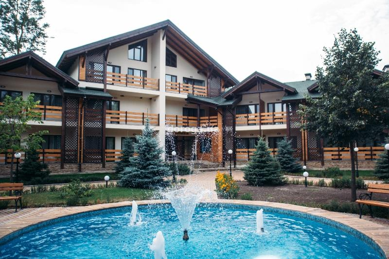 Готельно-ресторанний комплекс "ПриЛесное"